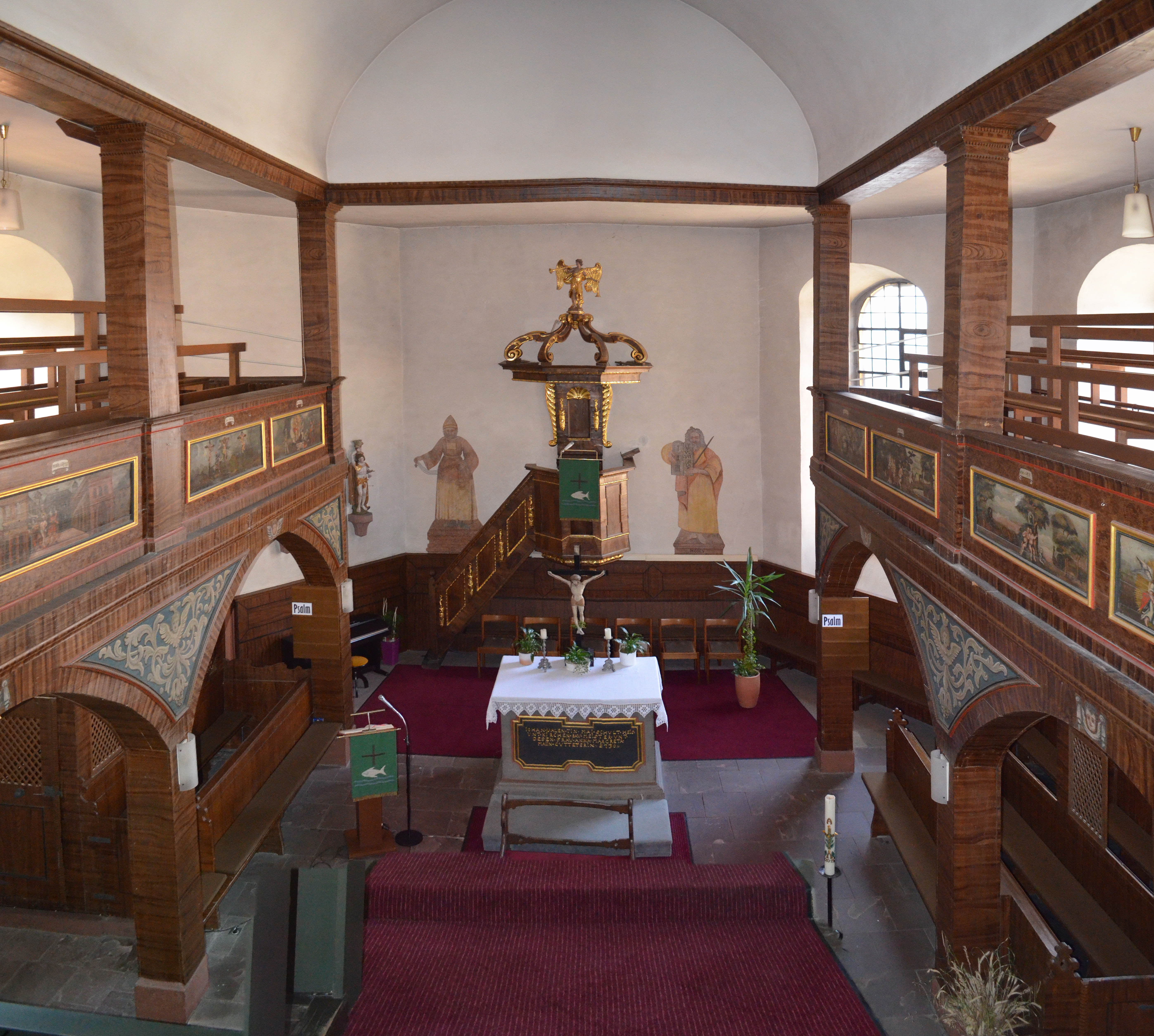 Hähnlein, Kirche, Innen